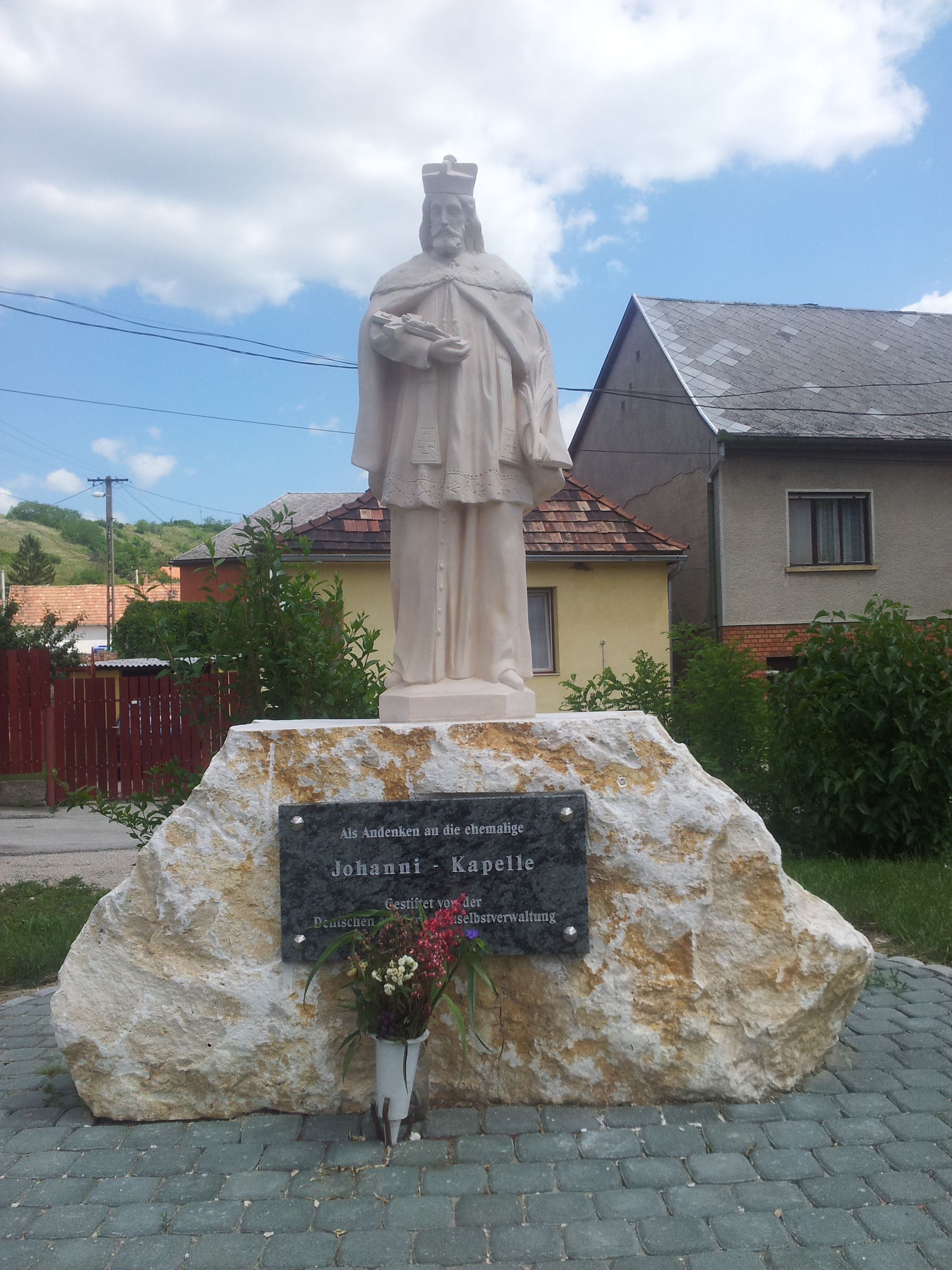 Nepomuki Szent János szobor Csolnok